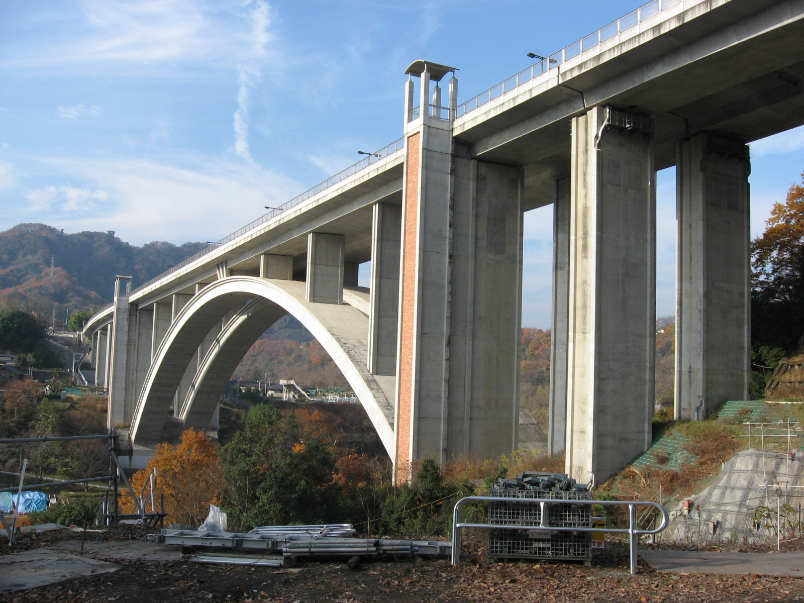 相模川に架かる新小倉橋